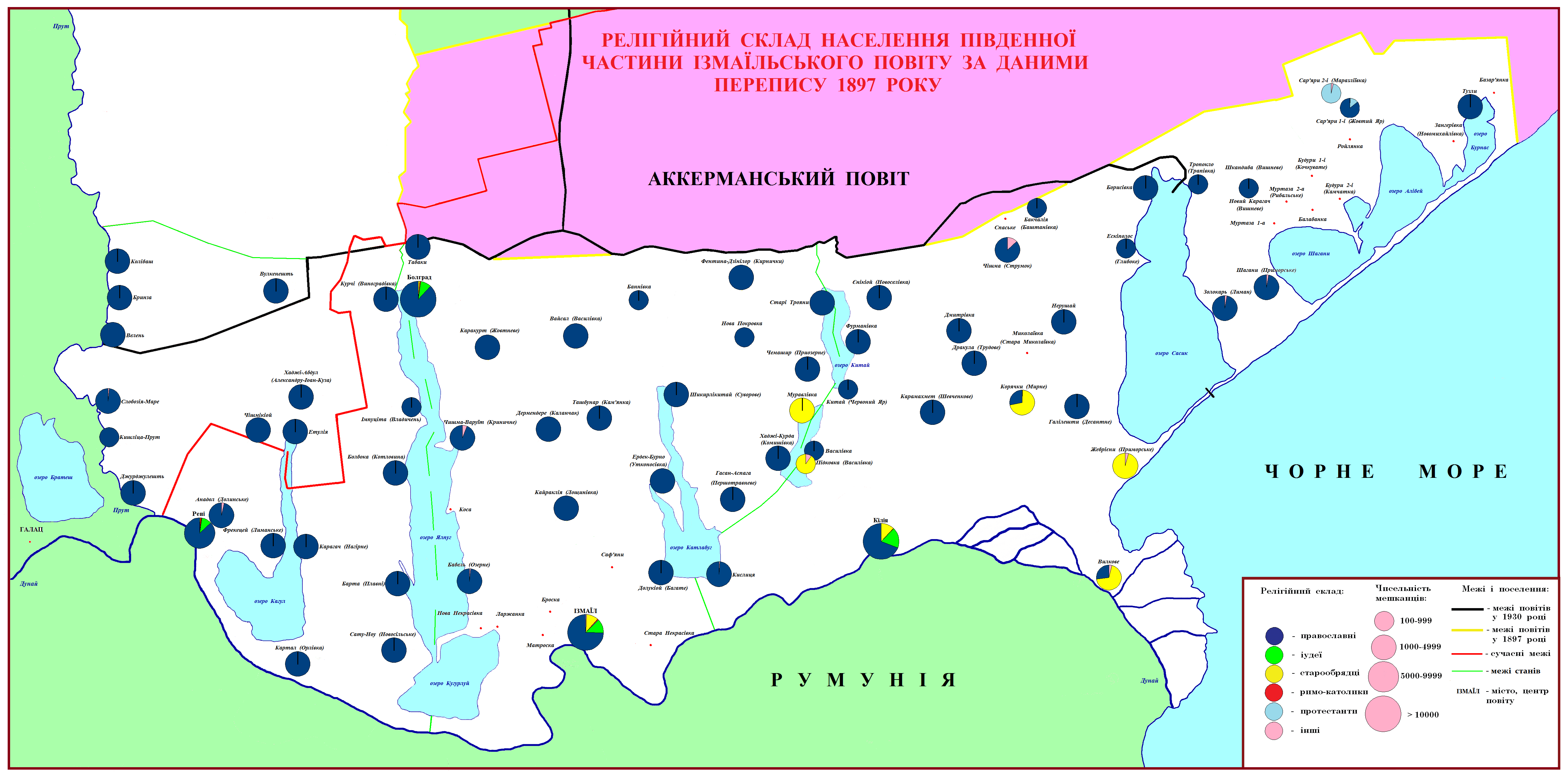 карта релігійного складу населення Ізмаїльського повіту (1897 р.)